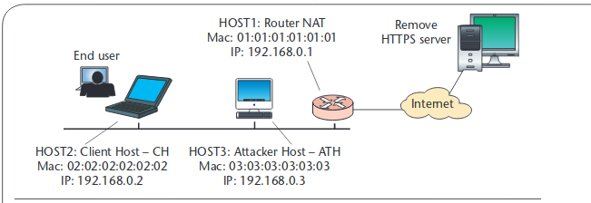 Стандартная конфигурация сети. Пользователь на хосте клиента (CH) хочет осуществить безопасную транзакцию, но уязвим для атаки «человек в середине». Злоумышленник (ATH) подключается к той же локальной сети, что и CH. Злоумышленник может войти в систему так, что подключение хоста будет оборвано. ATH будет перехватывать и управлять трафиком HTTPS между хостом CH и сервером.